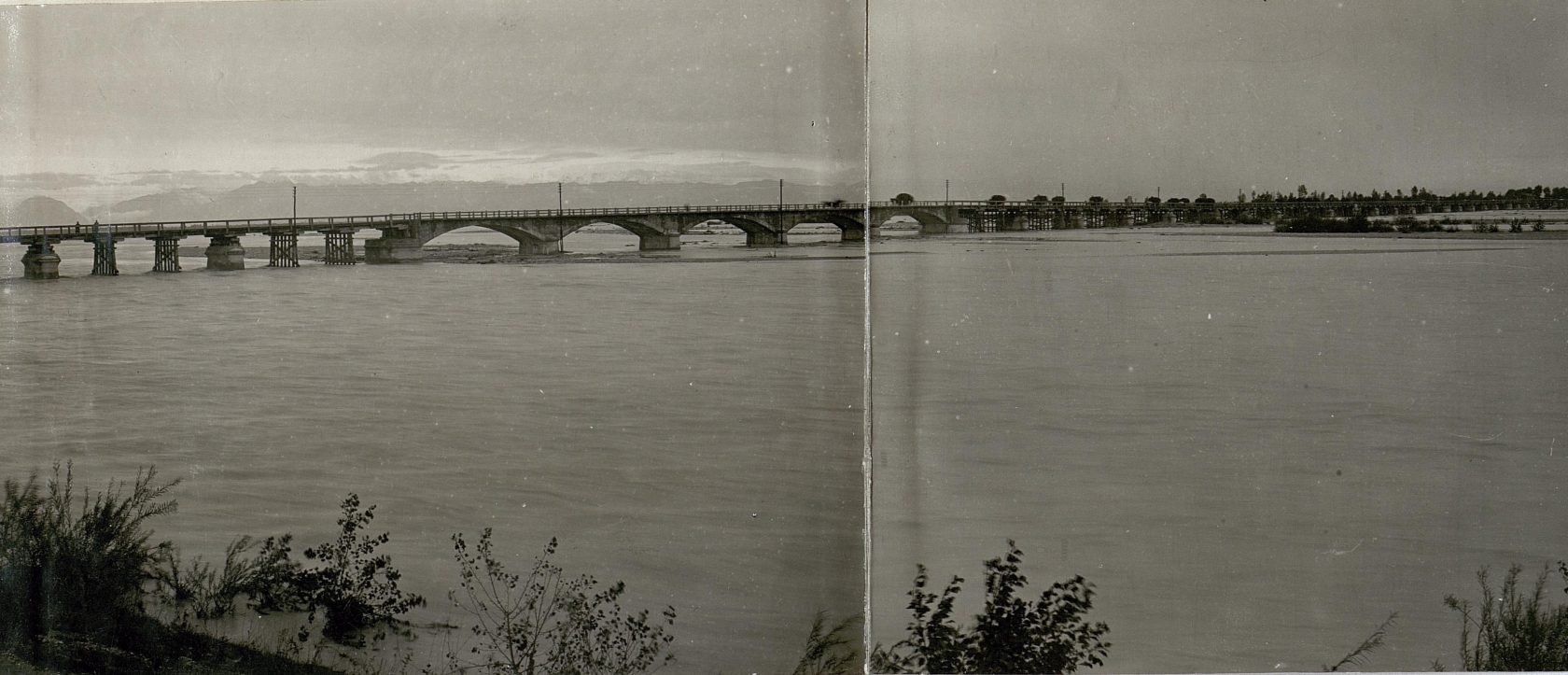 Überschwemmtes Tagliamentobett, Panorama Teil 2